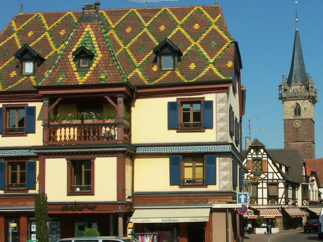 Obernai (Bas-Rhin) Place de l'Étoile